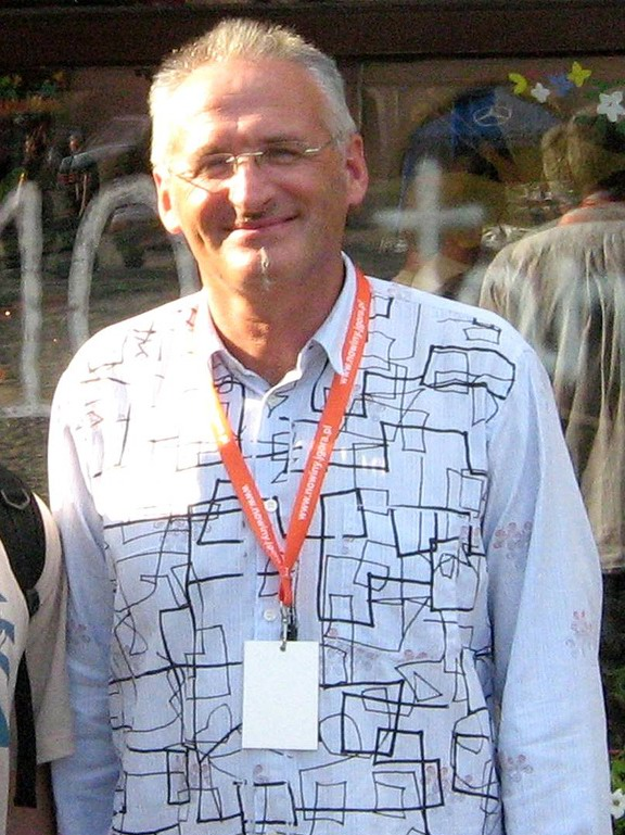 Krzesimir Dębski (ur. 26 października 1953 w Wałbrzychu), polski kompozytor, m.in. muzyki filmowej, skrzypek jazzowy i dyrygent.